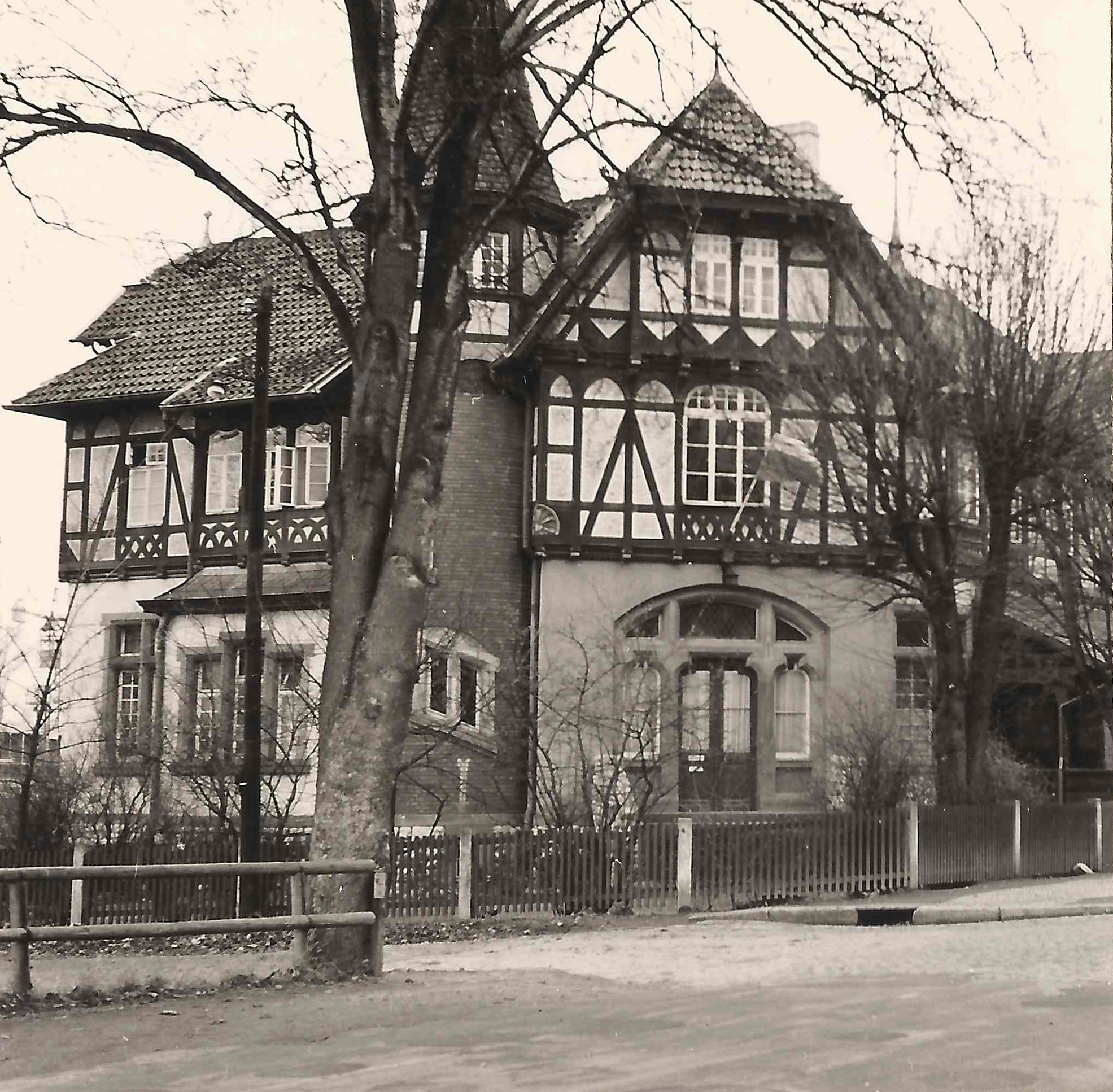 Früheres Korporationshaus des AV Palatia Göttingen. Das Gebäude in der Lotzestraße diente zuvor der Gartetalbahn als Bahnhof.